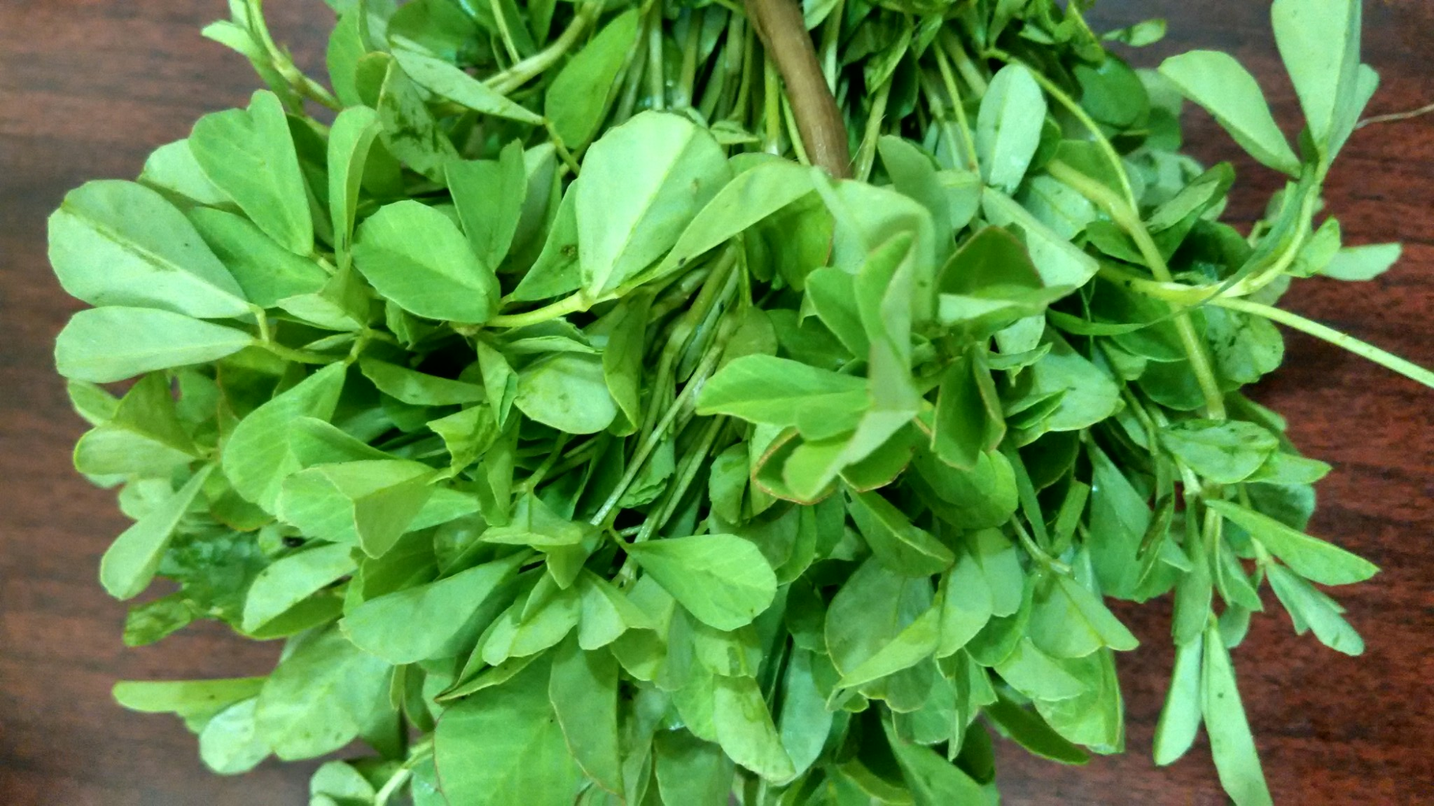 வெந்தயக்கீரை (Trigonella foenum-graecum).